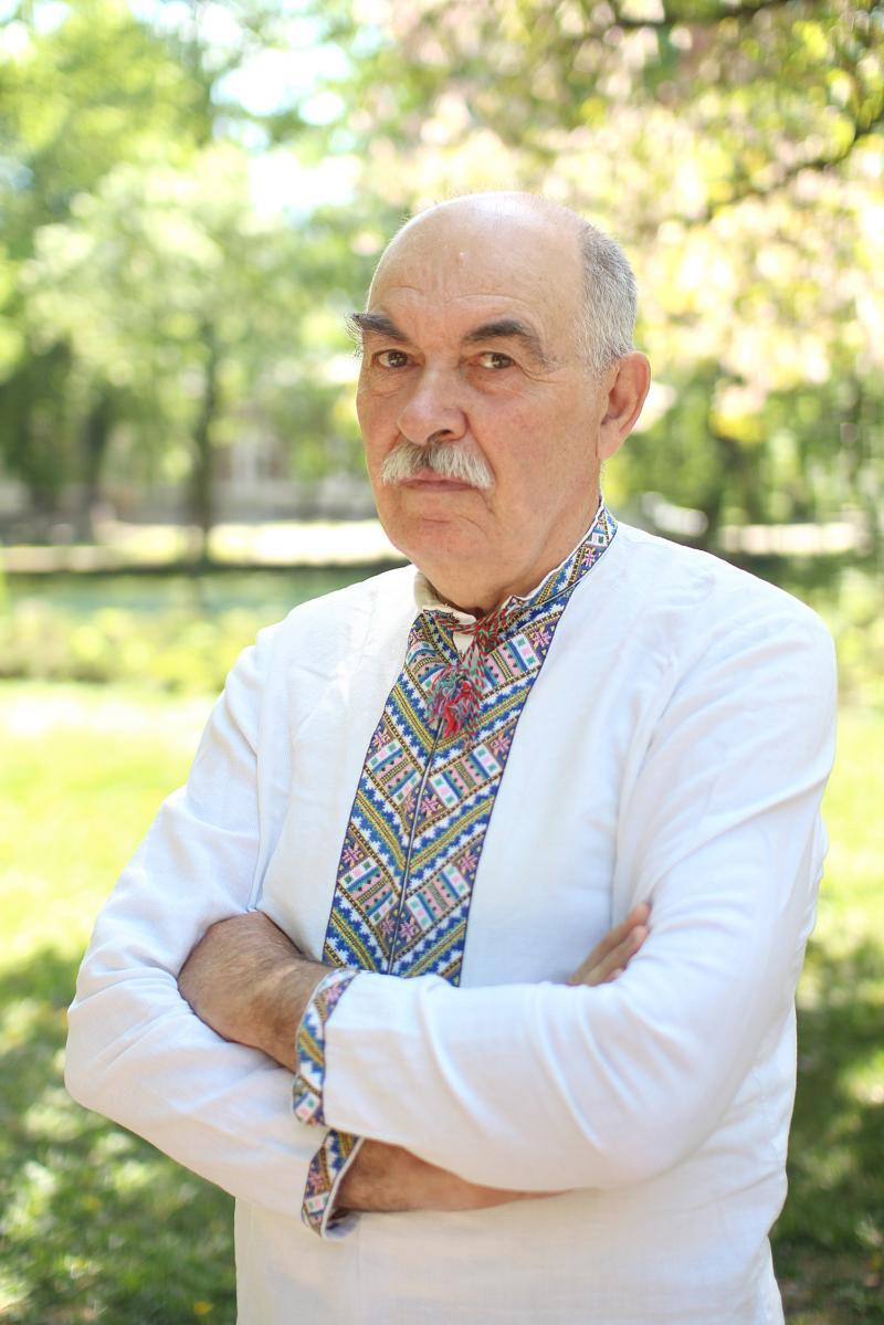 Матвіюк Кузьма Іванович